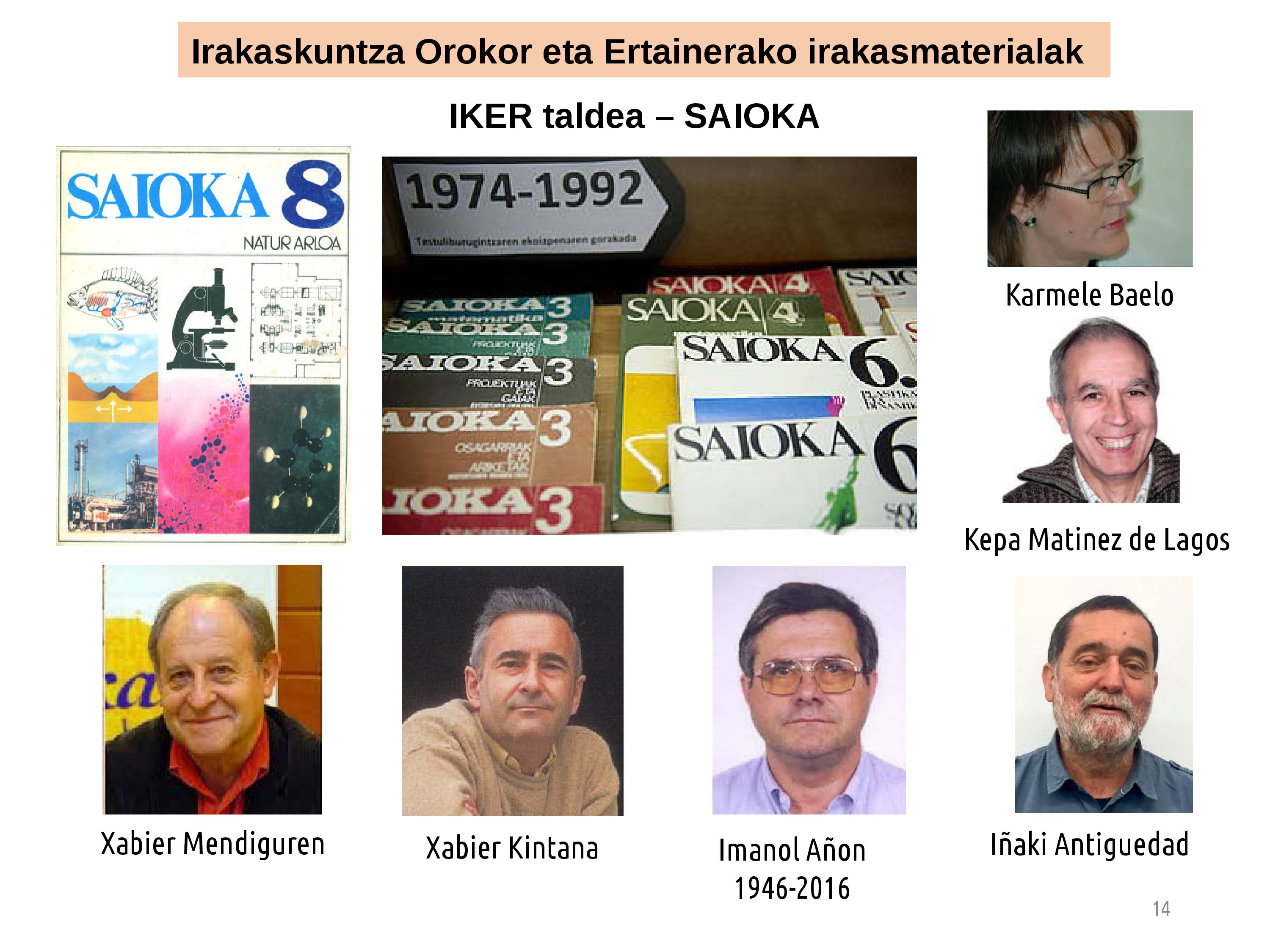 Jose Ramon Etxebarriaren hitzaldia: Euskarazko iIrakasmaterialen idazkuntzaren garapena. Batuaren helduaroa jardunaldia. Data: 2018ko ekainaren 21a. Tokia: Gasteiz - Oihaneder Euskararen Etxea